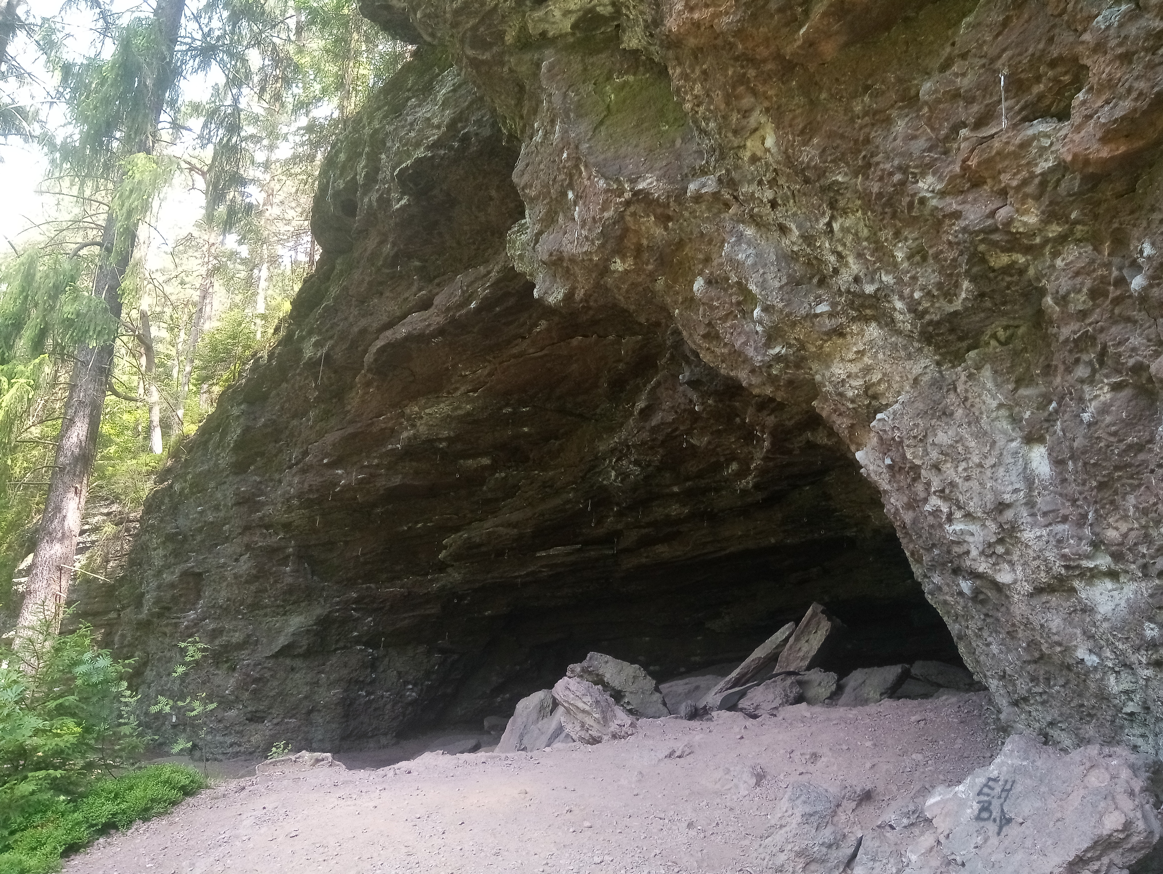 Hülloch